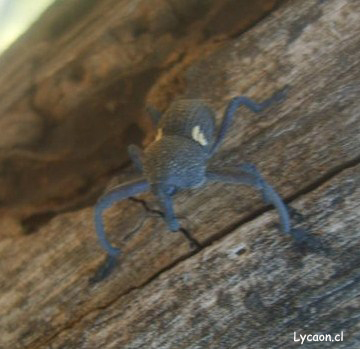 Burrito en el parque Mahuida, la Reina, Santiago de Chile